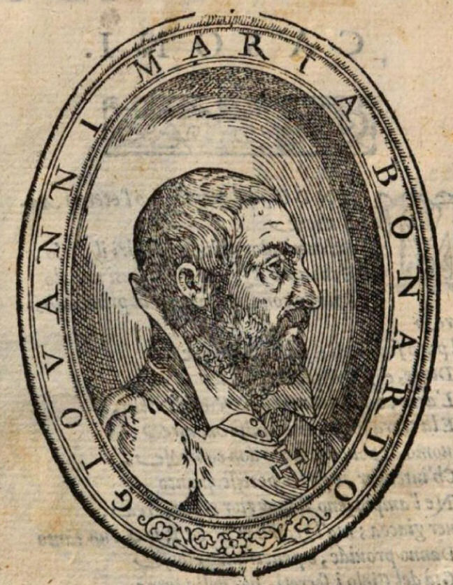 Ritratto di Giovanni Maria Bonardo.